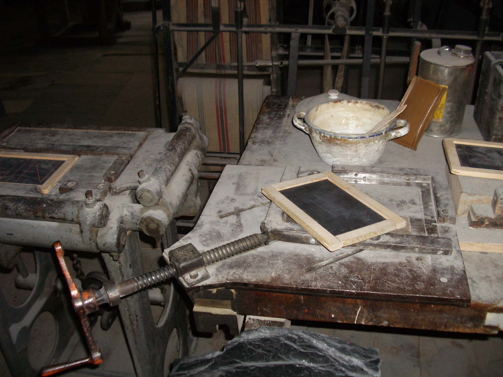 Elm GL, Switzerland self-made, June 2006